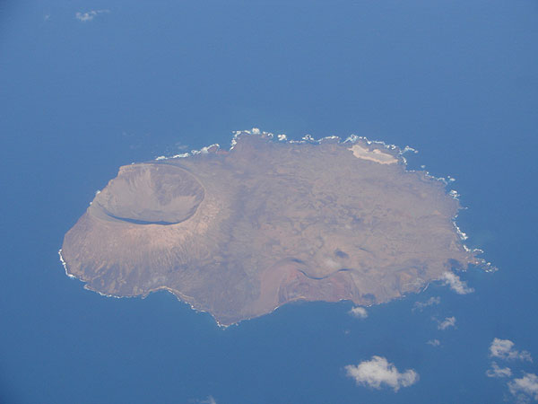 Isla de Alegranza